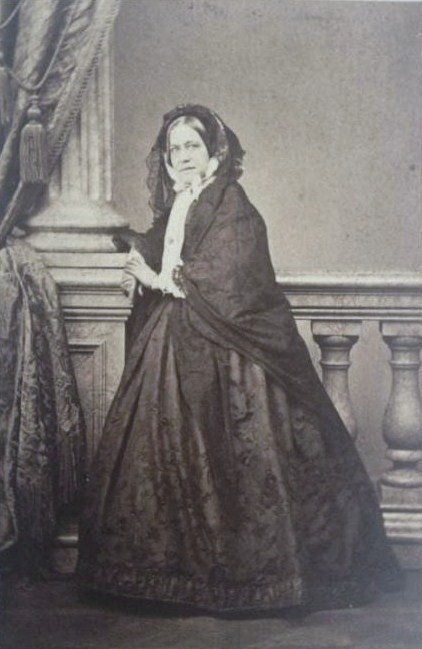 Княгиня Екатерина Алексеевна Долгорукова (1811-1872), ур. Малиновская.